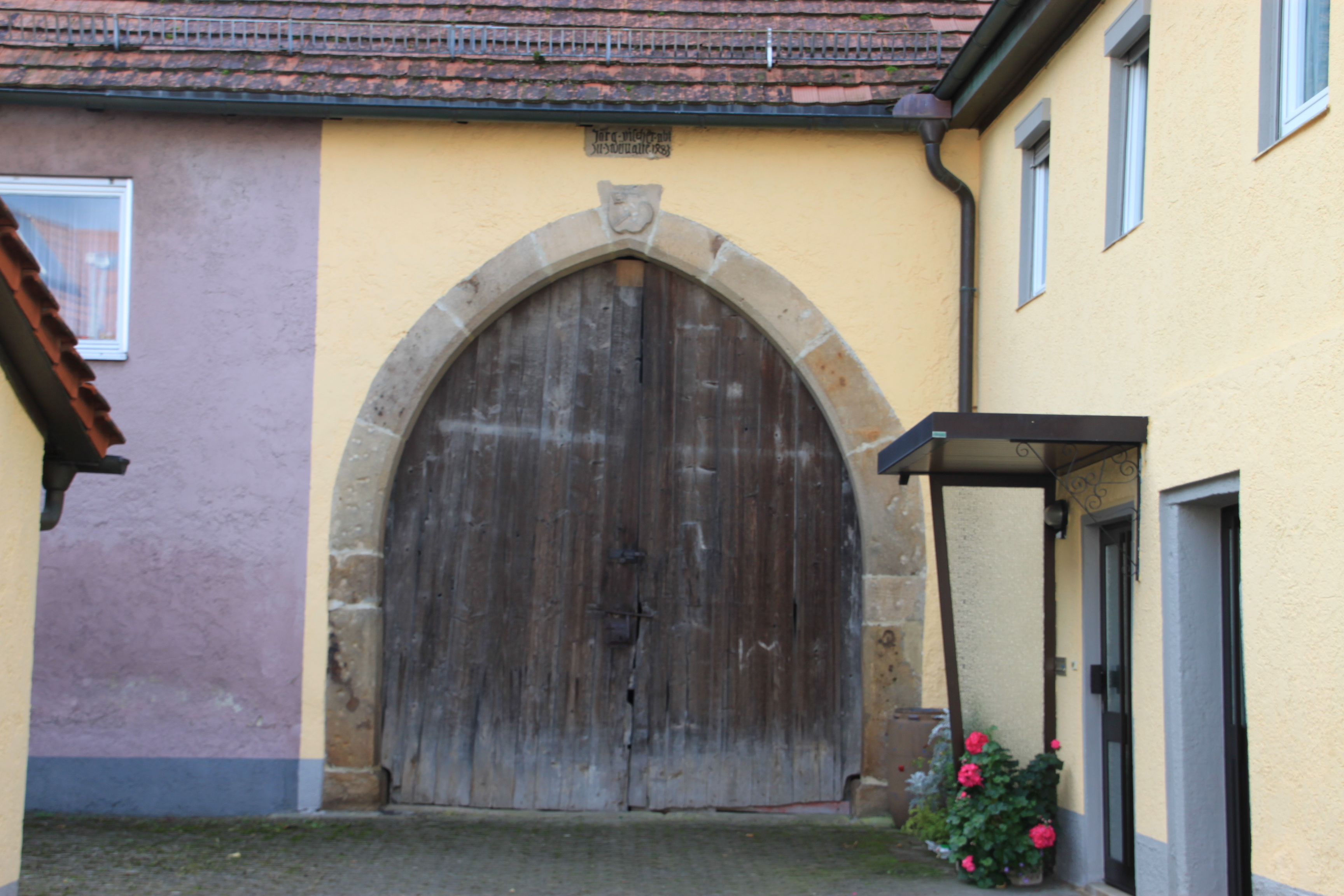 Zwiefaltener Zehntscheuer von 1483 in Tübingen-Derendingen. Inschrift über dem Torbogen: „Jörg Vischer Abt zu Zwiefalten 1483“